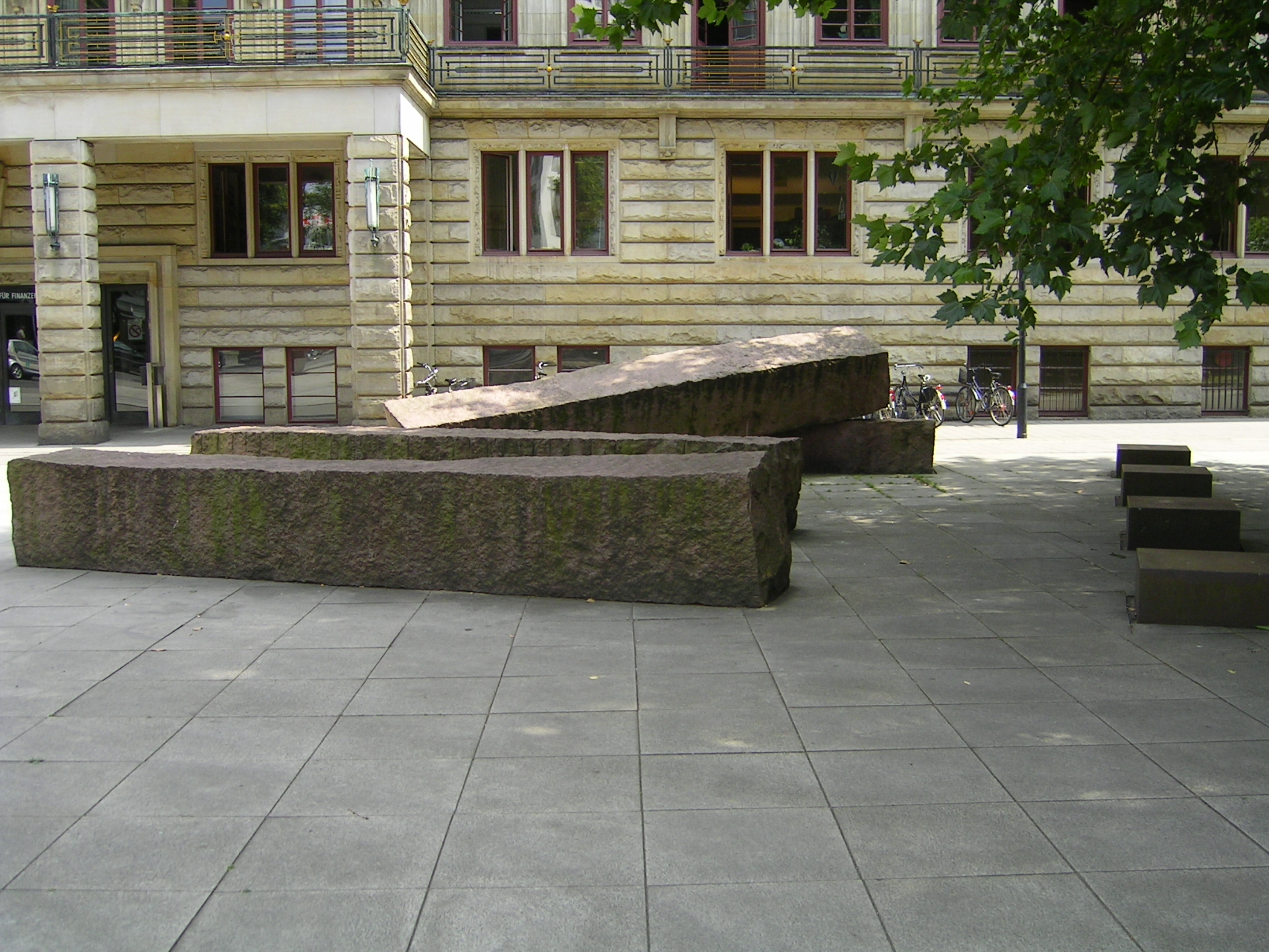 "der senator fur finanzen" building in Bremen City